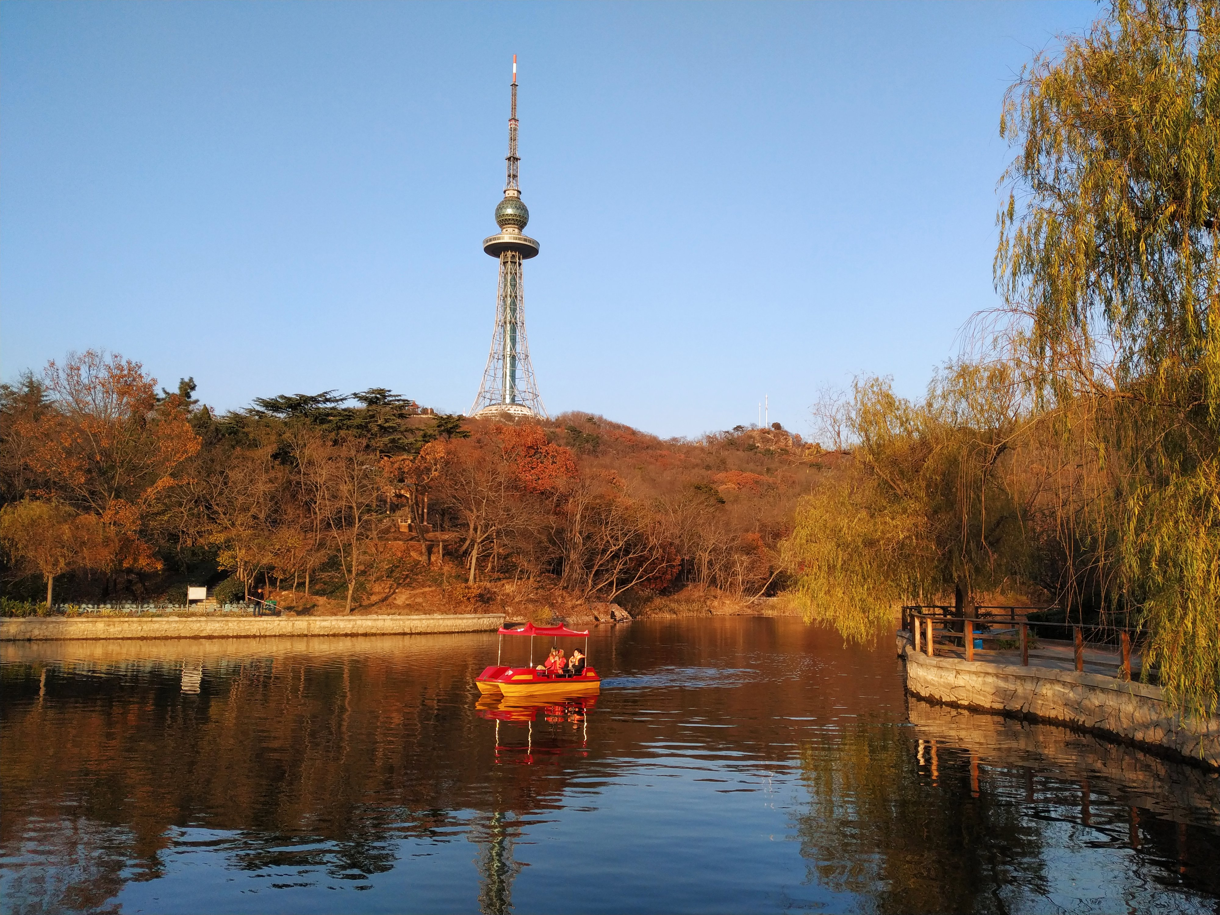 在青岛中山公园湖畔远望青岛电视塔